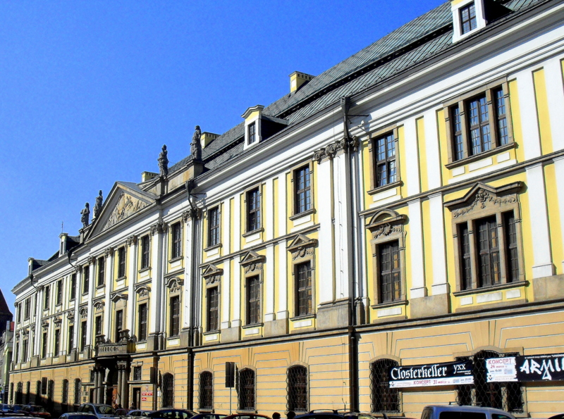 Legnica, Akademia Rycerska